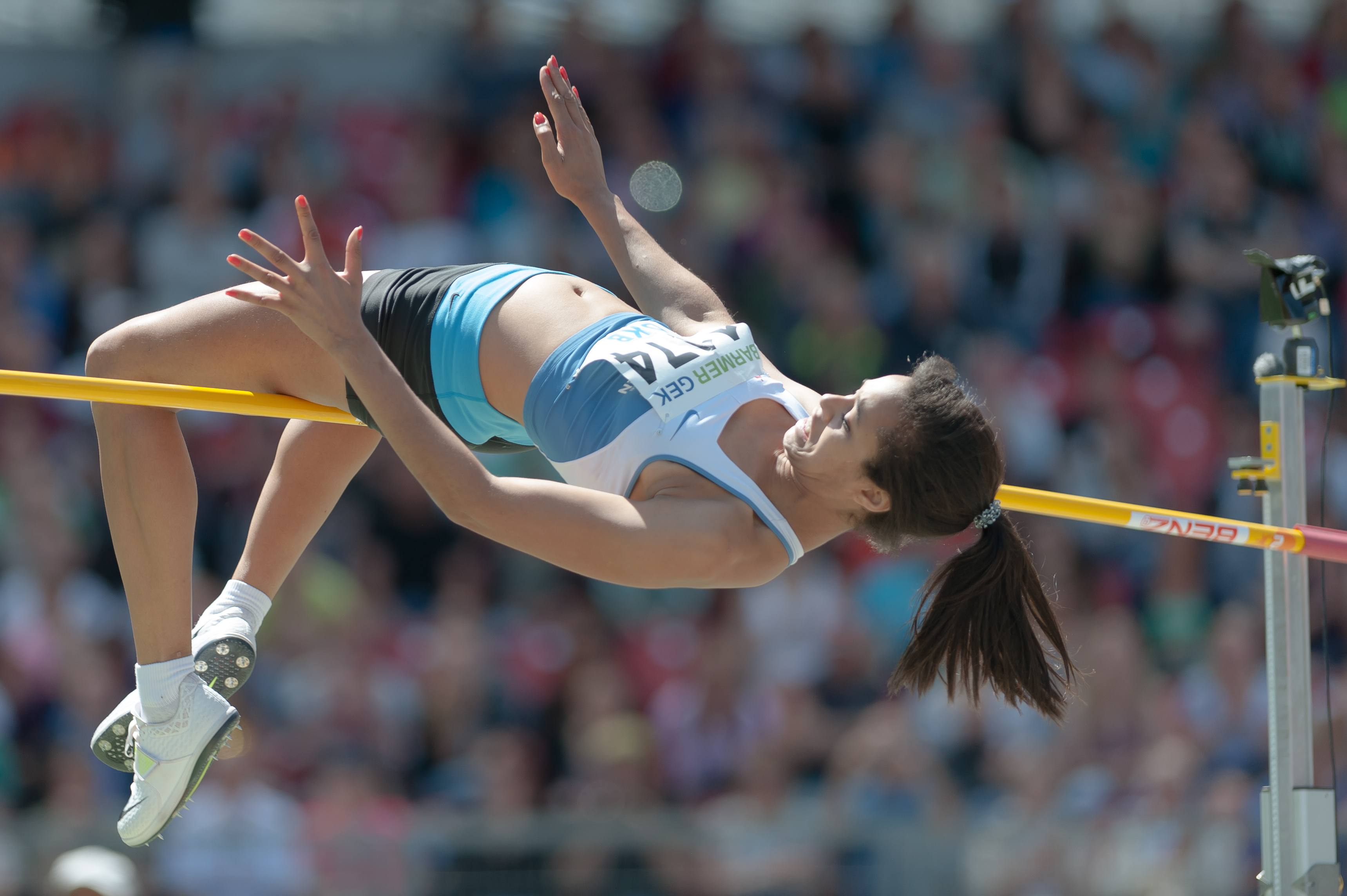 Deutsche Leichtathletik-Meisterschaften 2015: Frauen Hochsprung - Marie-Laurence Jungfleisch, LAV Stadtwerke Tübingen